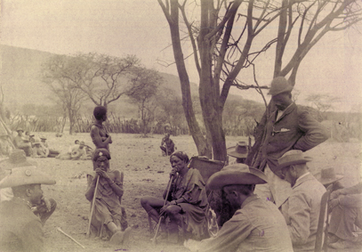 Hererofürst Kambazembi und Regierungsrat Friedrich von Lindequist bei einer Beratung, etwa 1898